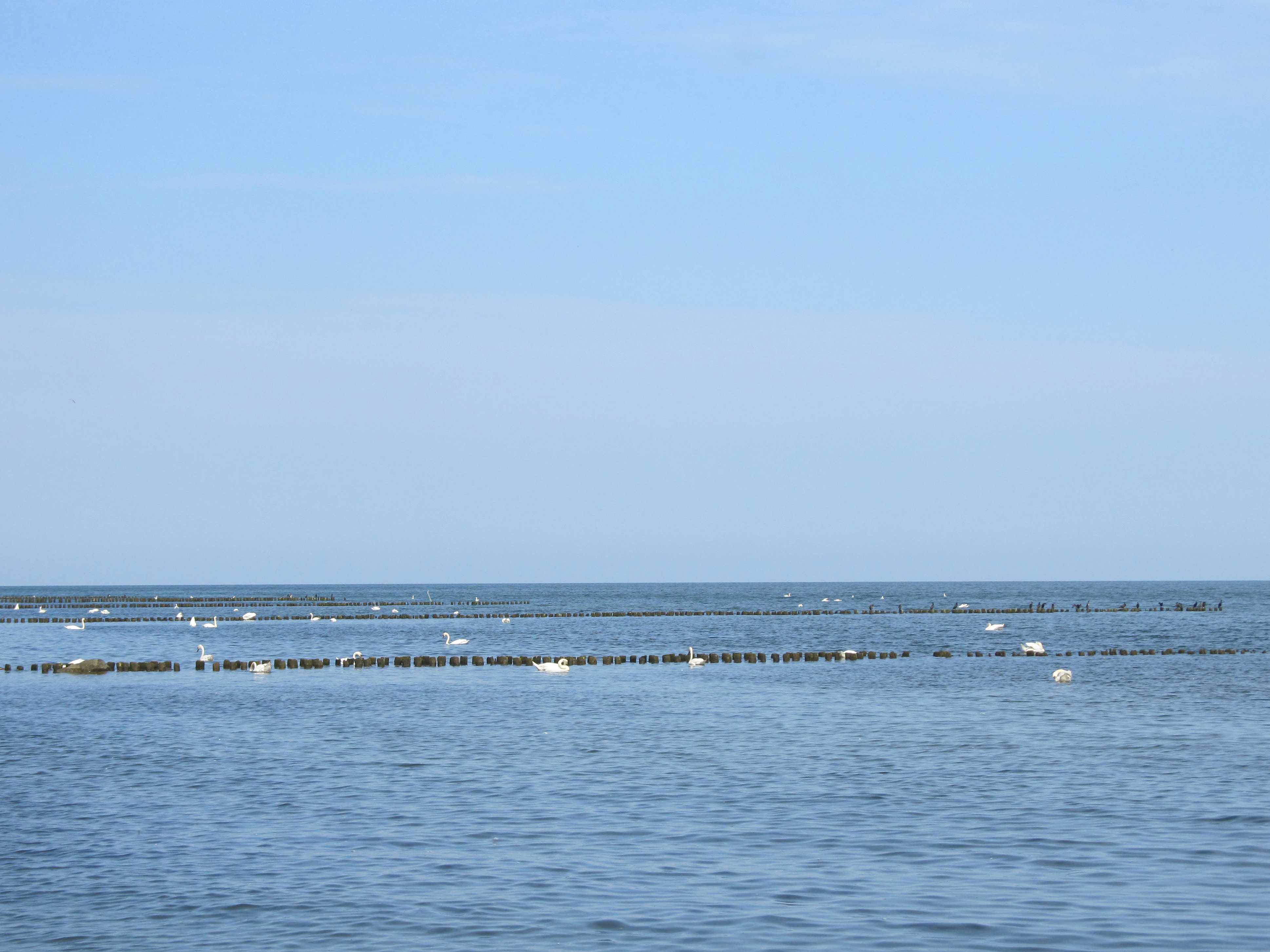 Колония лебедей на фоне деревянных волнозащитных сооружений пляжа Отрадного (Георгенсвальде) в Калининградской области